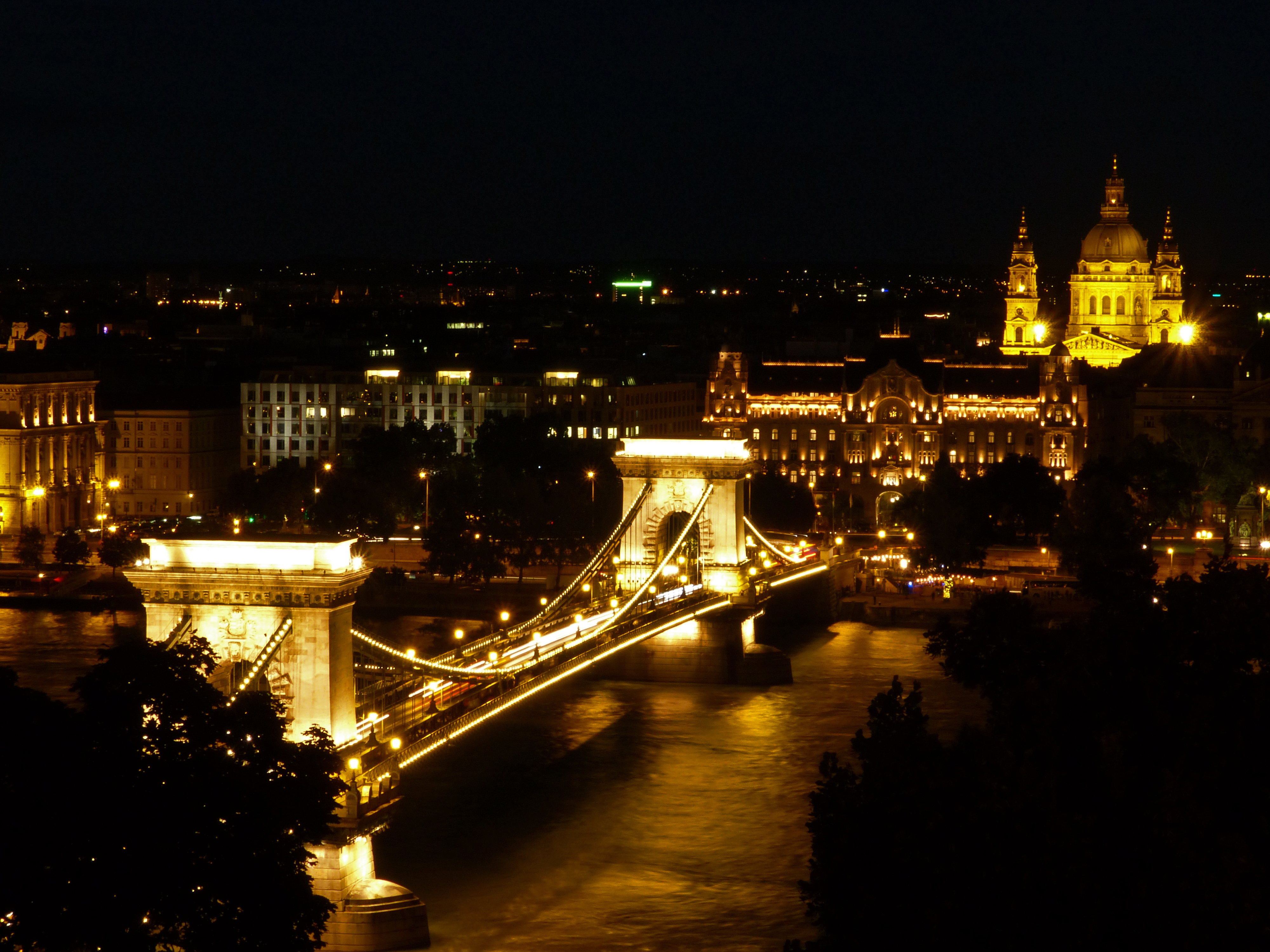 Kettenbrücke in Budapest bei Nacht